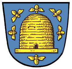 Wappen des Frankfurter Stadtteils Bockenheim